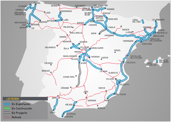 Red de autopistas en las que hay que pagar por circular, en España, en 2012